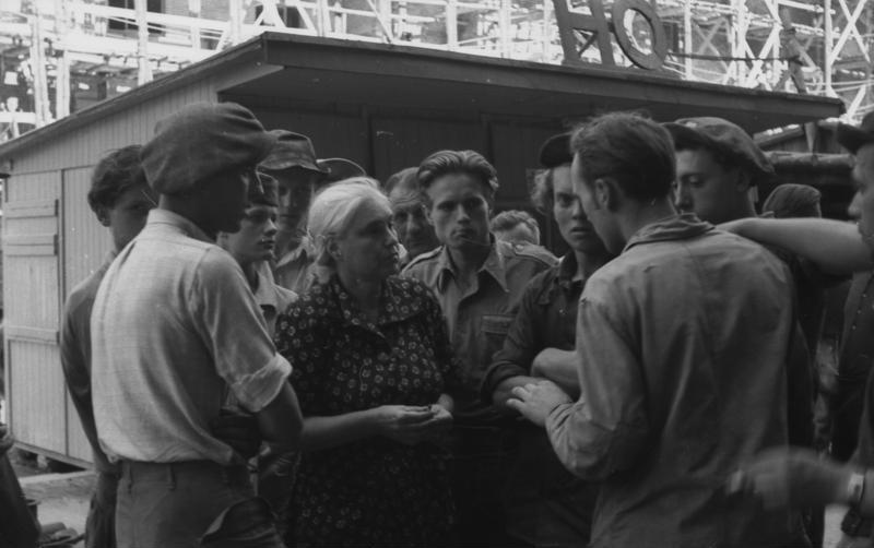 Berlin, Anna Seghers mit Bauarbeitern ADN-ZB/Junge/29.6.1953/Nationalpreisträger Seghers und Kuba diskutieren mit Berliner Bauarbeitern. Die bekannten Schriftsteller und Nationalpreisträger Anna Seghers und Kuba traf man am 29.6.53 auf der Baustelle der Deutschen Staatsoper Unter den Linden, wo sie mit den Bauarbeitern über die große Bedeutung der jüngsten Beschlüsse unserer Regierung diskutierten. U.B.z.: Leninpreis- und Nationalpreisträgerin Anna Seghers (Mitte) in reger Diskussion mit den Bauarbeitern, die viele Fragen zu den neuesten Ereignissen stellen. Abgebildete Personen: Seghers, Anna: Schriftstellerin, Präsidentin des Schriftstellerverbandes, DDR (GND 118612743)